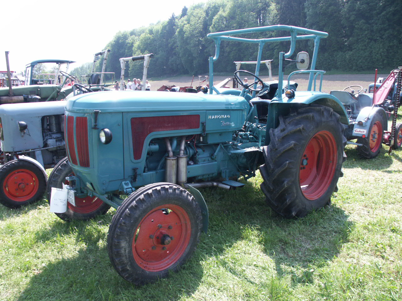 Hanomag Brillant 600, Baujahr 1964